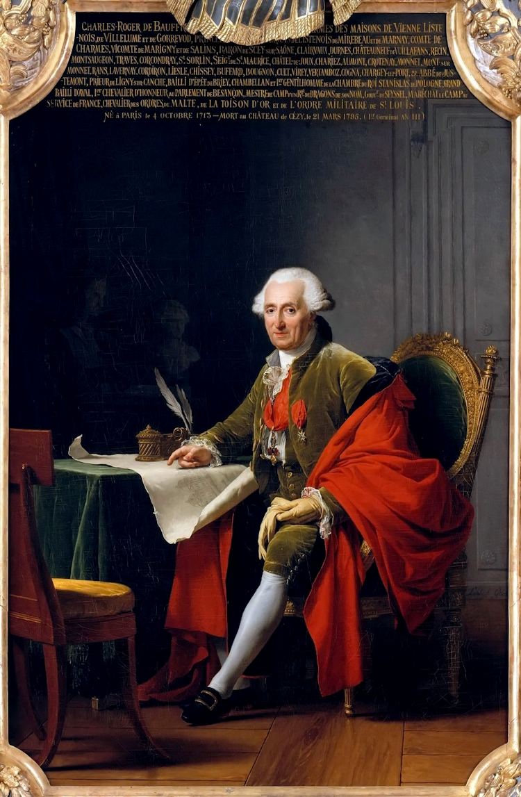 Charles-Roger, prince de Bauffremont (1713-1795)